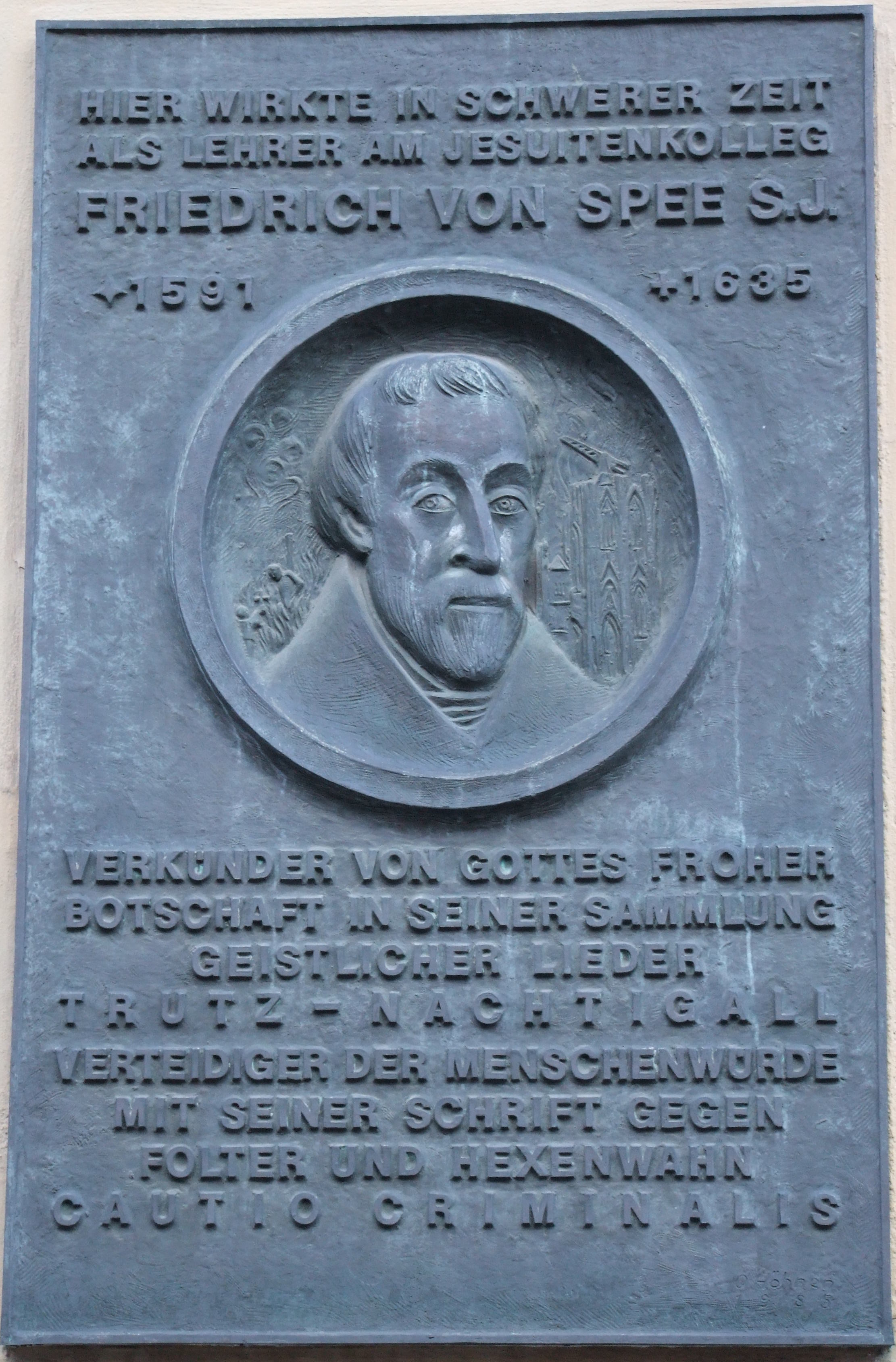 Gedenktafel für Friedrich Spee am Haus des erzbischöflichen Generalvikariats Marzellenstr. 32 in Köln. Entwurf: Olaf Höhnen. Höhe 140 cm. Aufgestellt 1985.